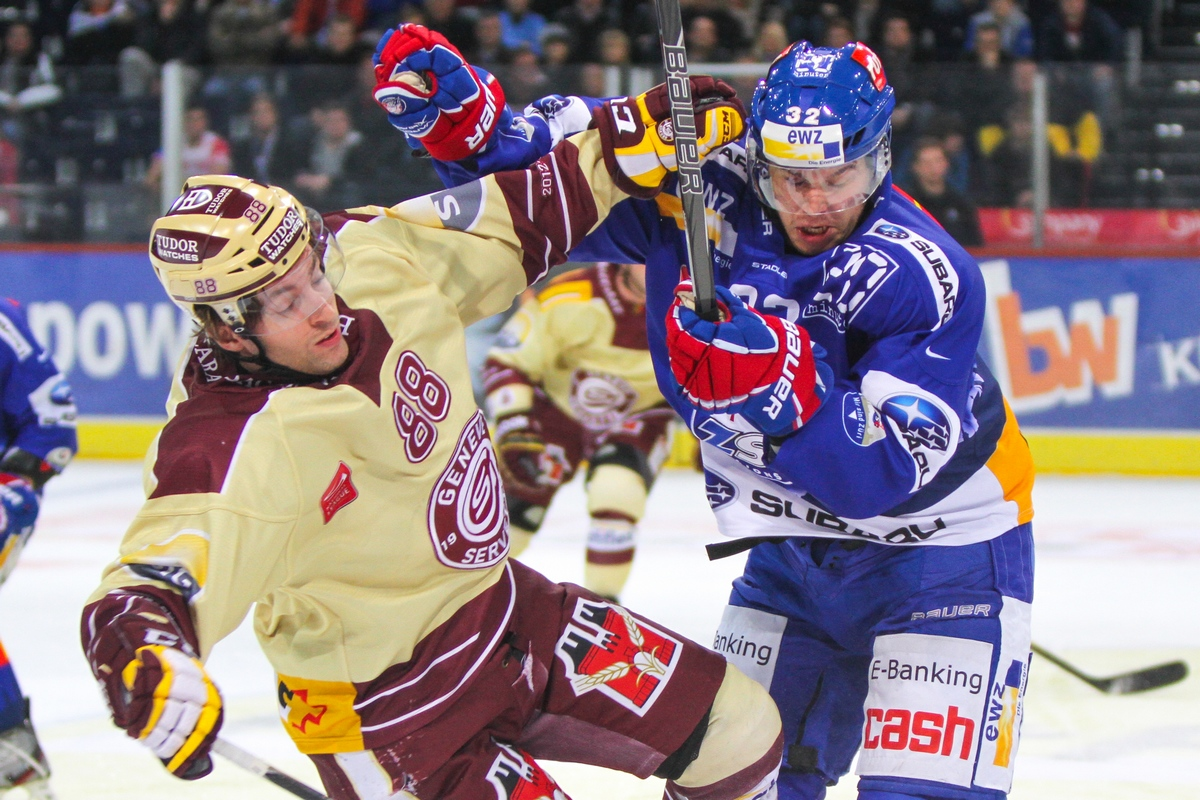 Kevin Romy, à gauche, face à Dustin Brown, à droite, lors d'un match opposant le ZSC Lions au Genève-Servette HC, le 16 décembre 2012.